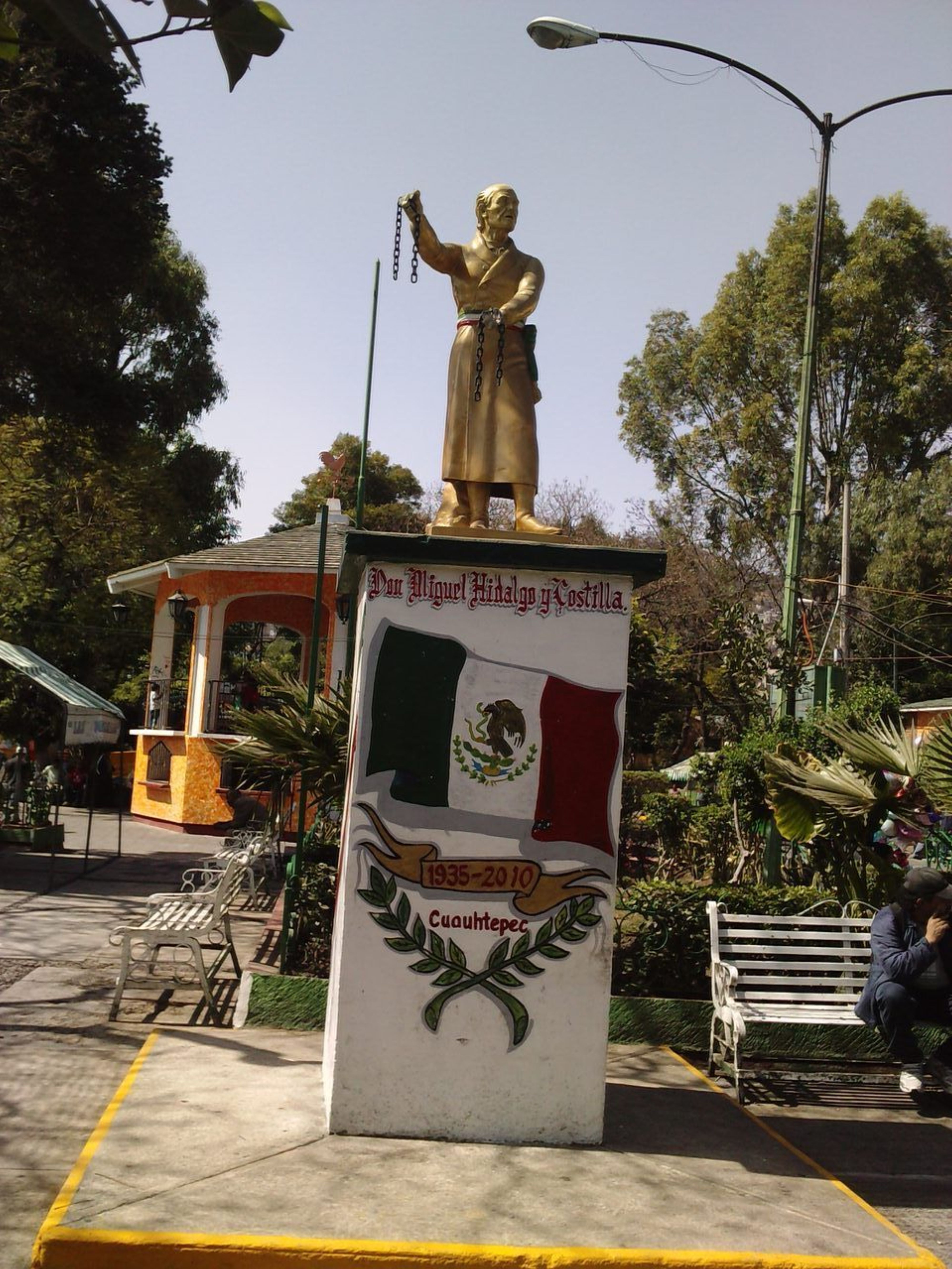 Estatua a Miguel Hidalgo, Plaza Hidalgo, Cuautepec Barrio Alto, Delegación Gustavo A. Madero, D.F. México.